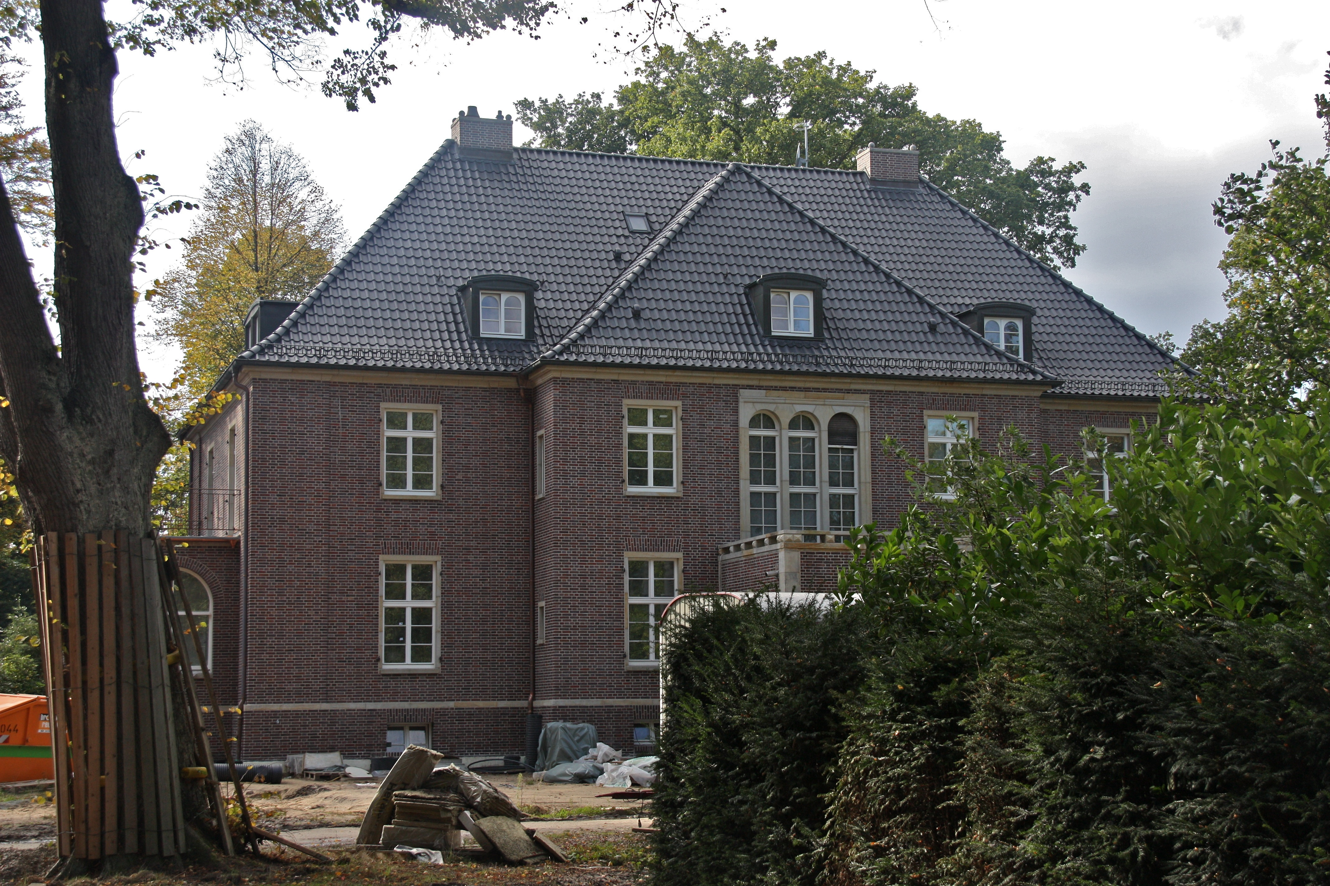 Hamburg, Osdorf, Adalbertstr. 11This is a photograph of an architectural monument.